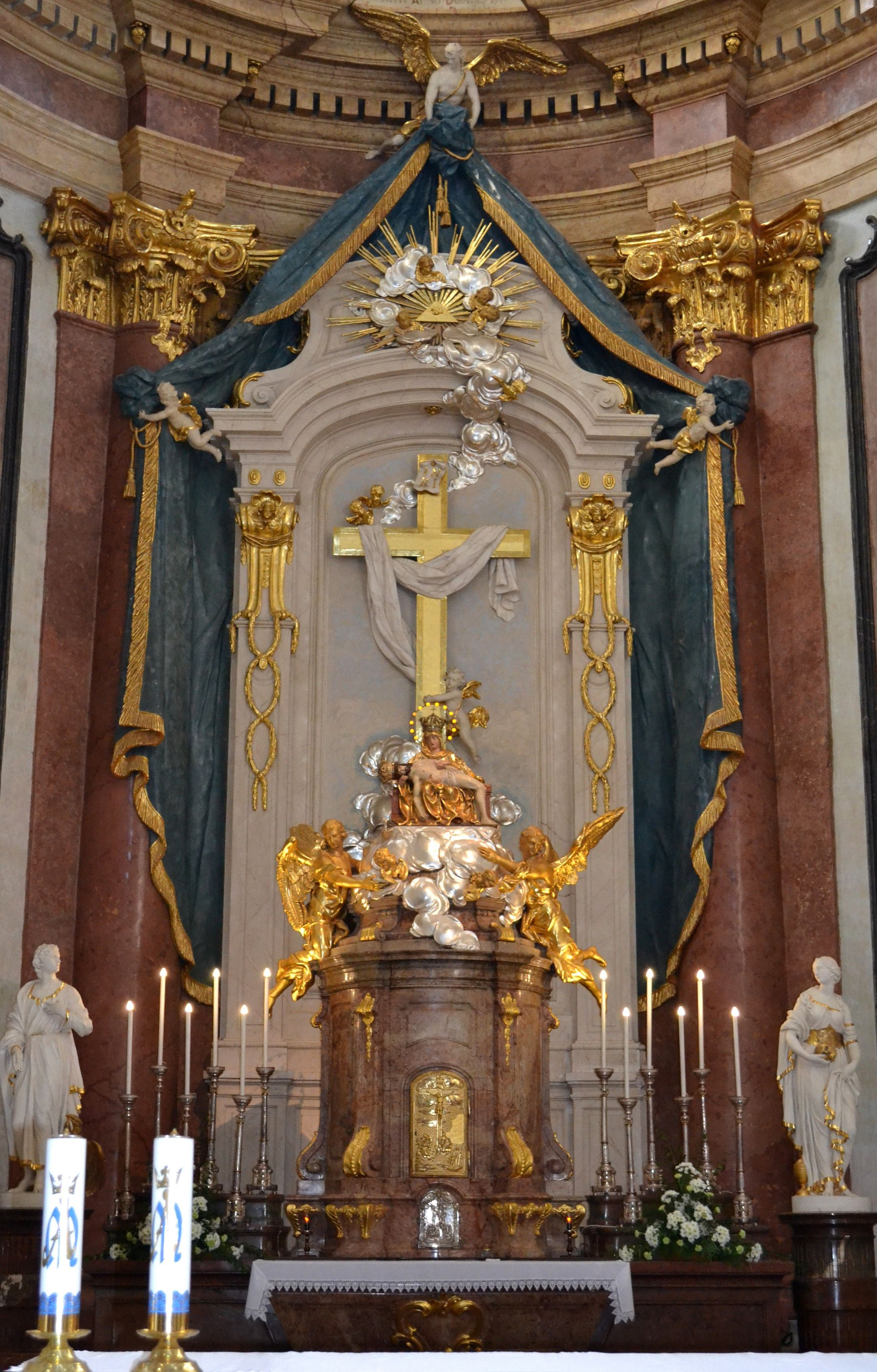 Šaštín-Stráže (okr. Senica), Bazilika Sedembolestnej Panny Márie; hlavný oltár